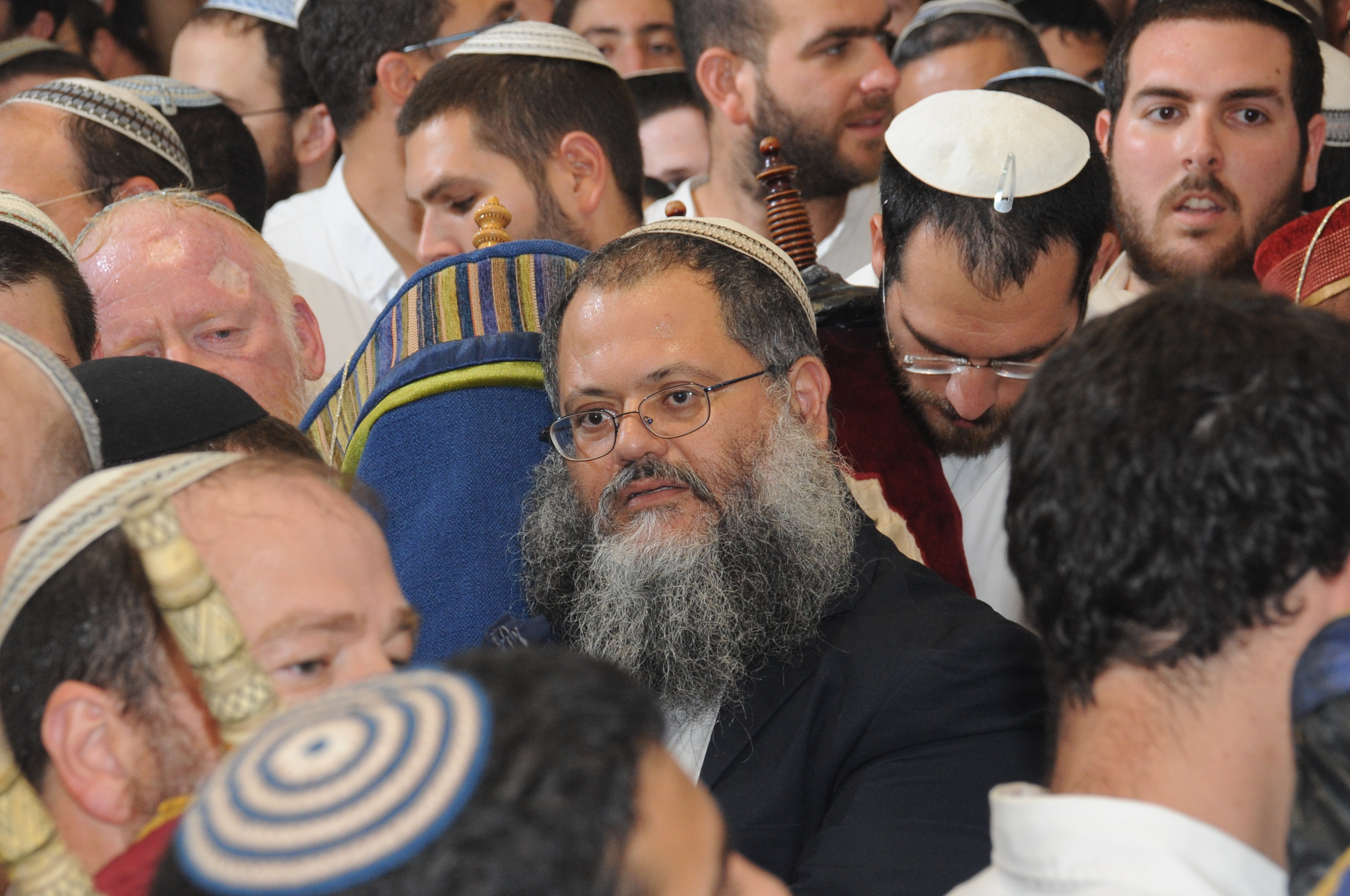 הרב שלמה לוי